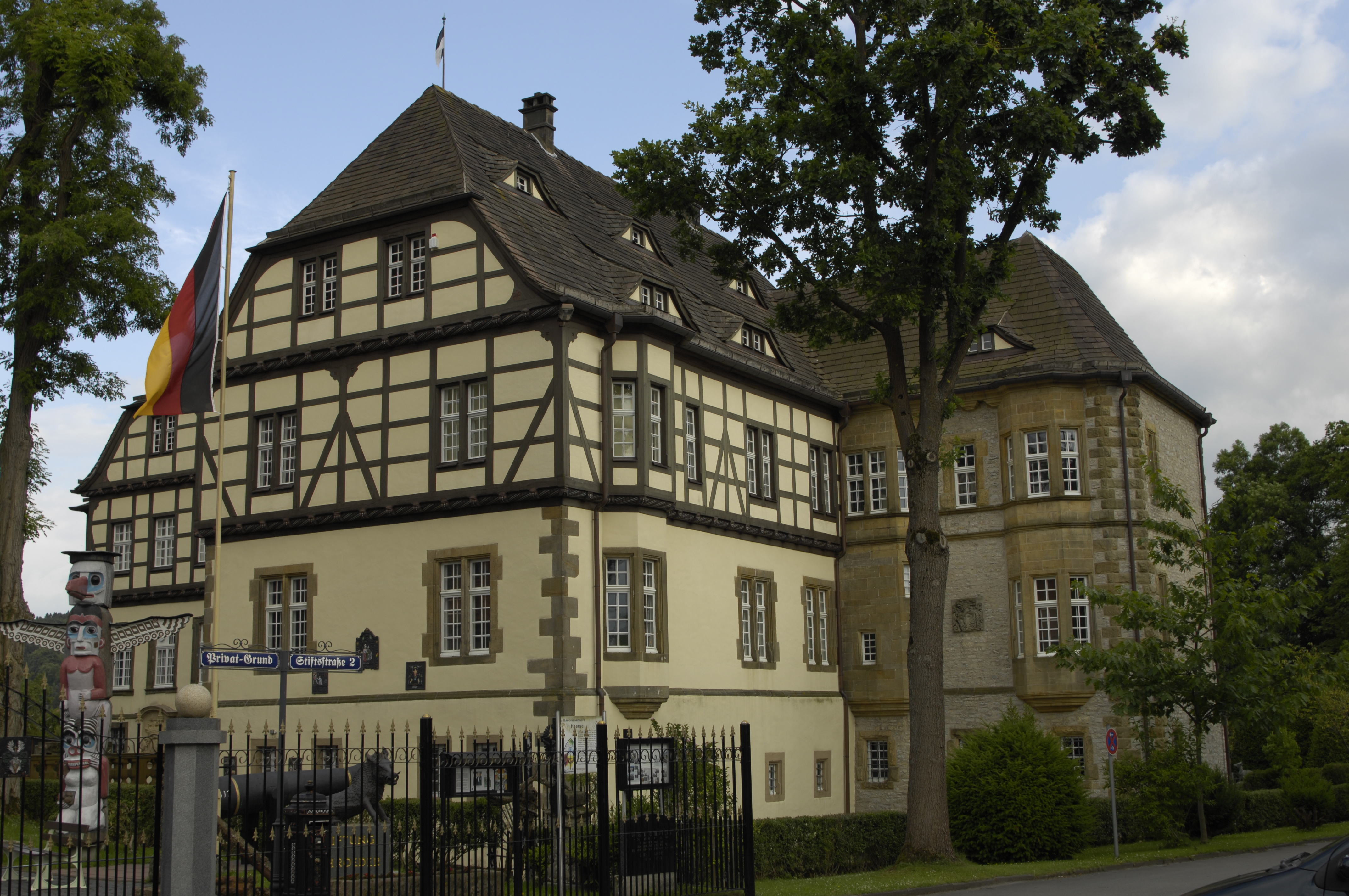 Schloss Neuenheerse, Bad Driburg, Kreis Höxter